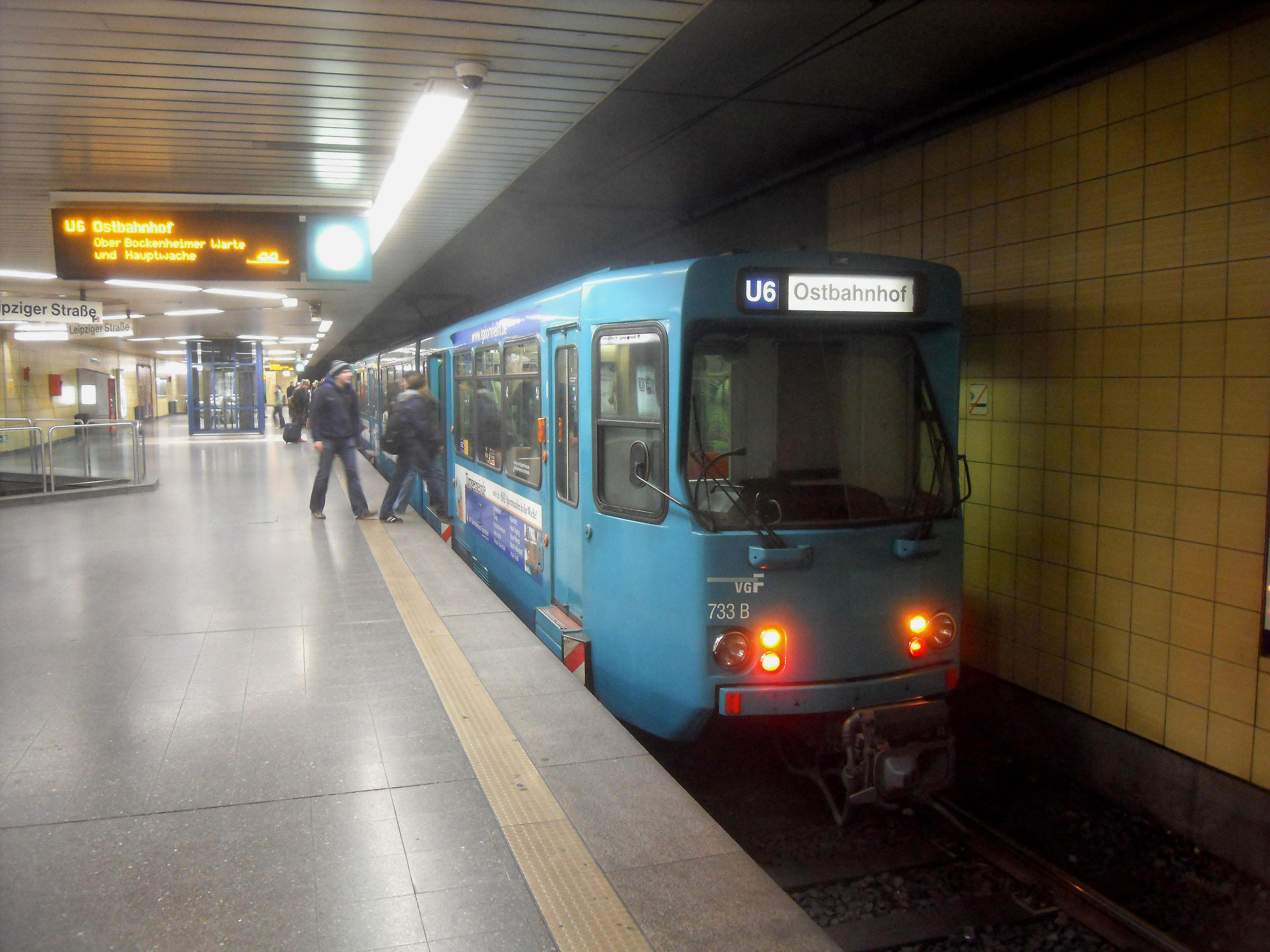 U-Bahn-Wagen des Types Ptb der U-Bahn Frankfurt am Main im U-Bahnhof Leipziger Straße auf der Linie U 6 auf dem Weg nach Bahnhof Frankfurt (Main) Ost in Hessen (Deutschland)